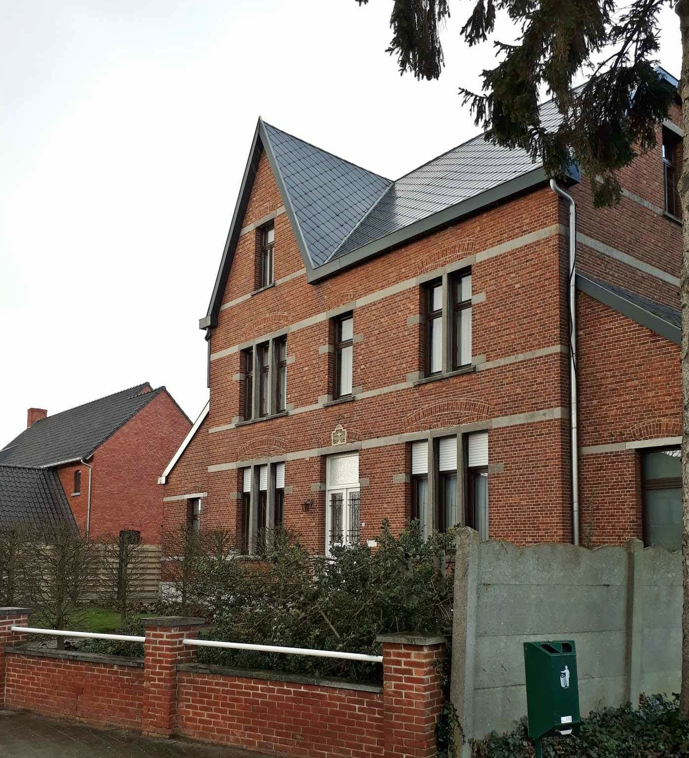 Pastorijwoning gelegen aan de Everselkiezel 90.